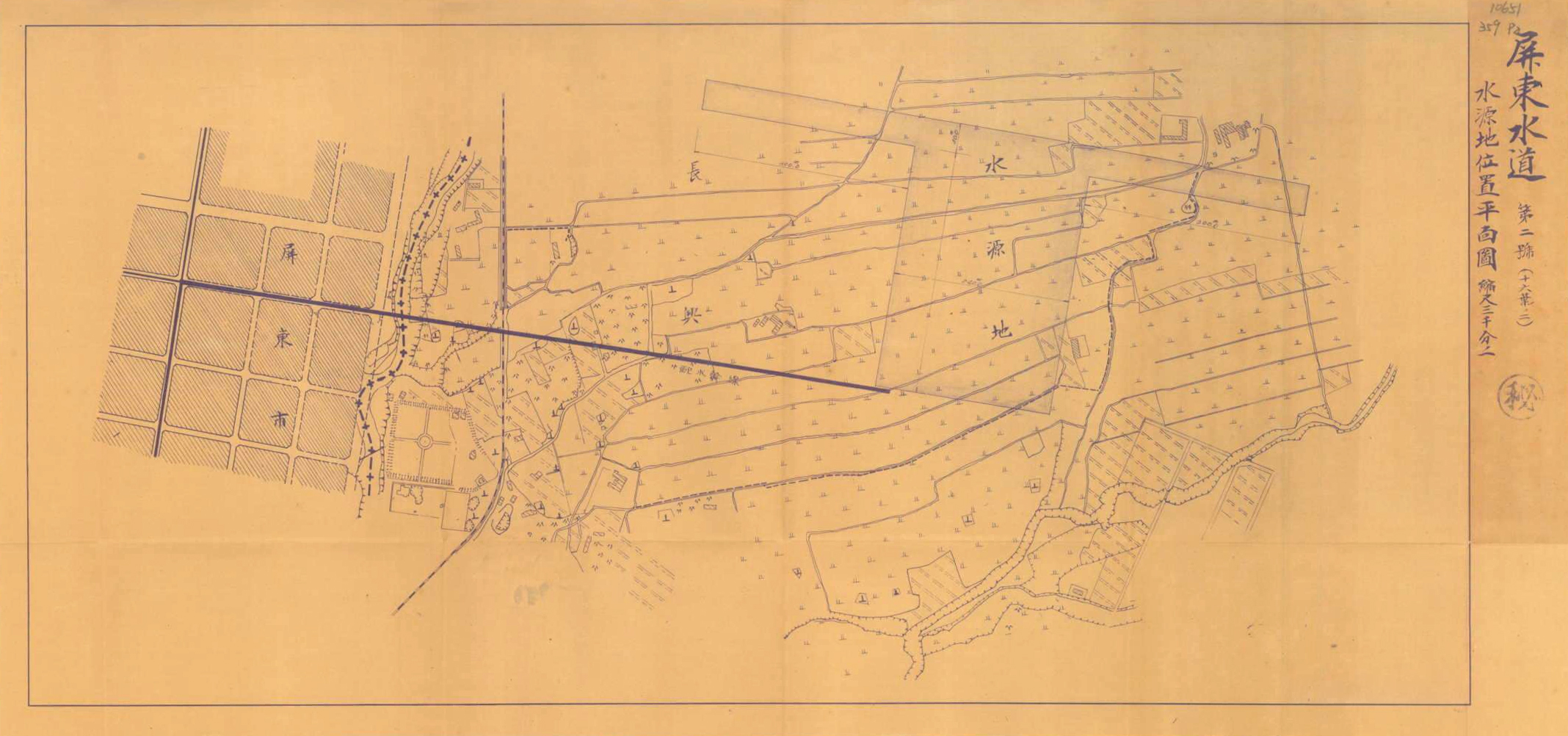 1936年新設的屏東水道，水源地位於屏東市區東側。